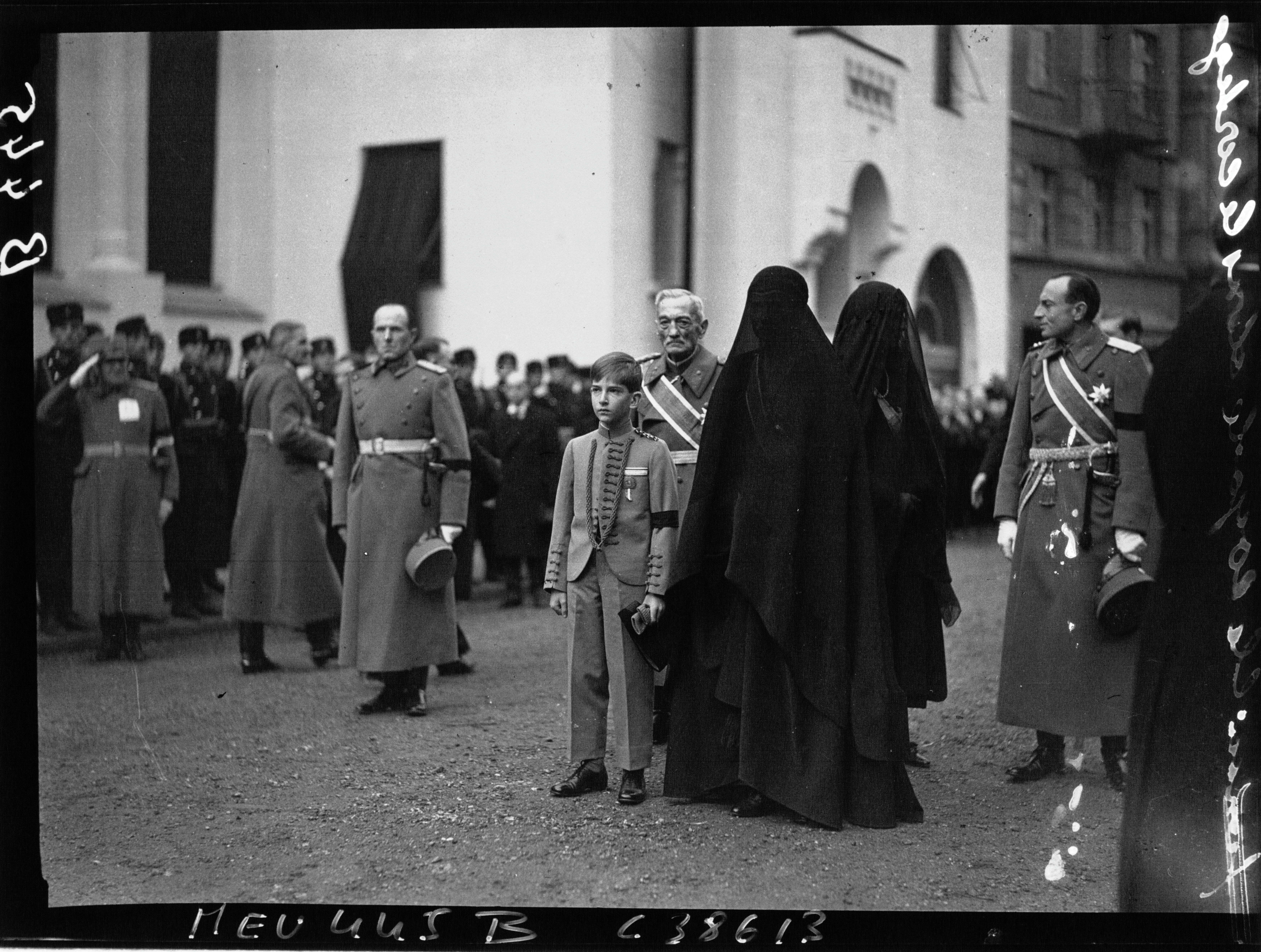 El rey Pedro II de Yugoslavia, centro, y su tío el regente Pablo (derecha) en las exequias de Alejandro I de Yugoslavia, 1934.